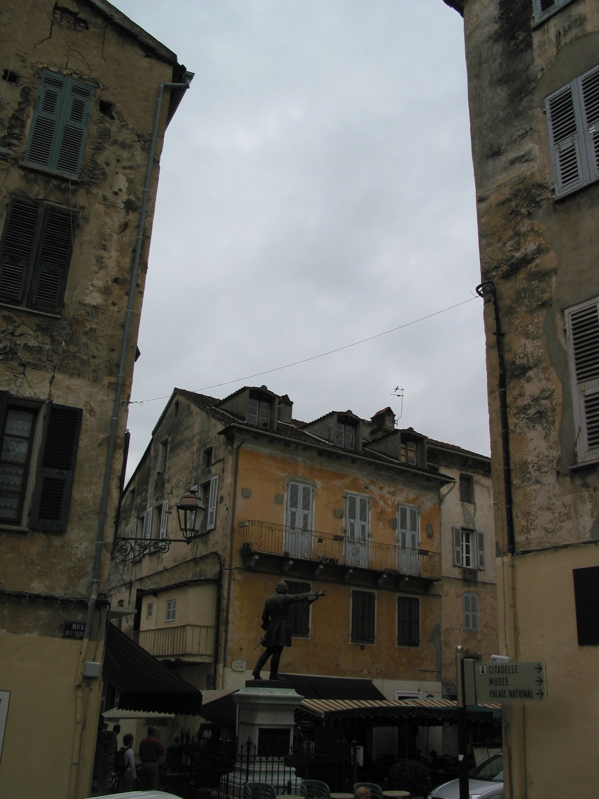 Corte (Haute-Corse, France) - Statue du général Gaffori.